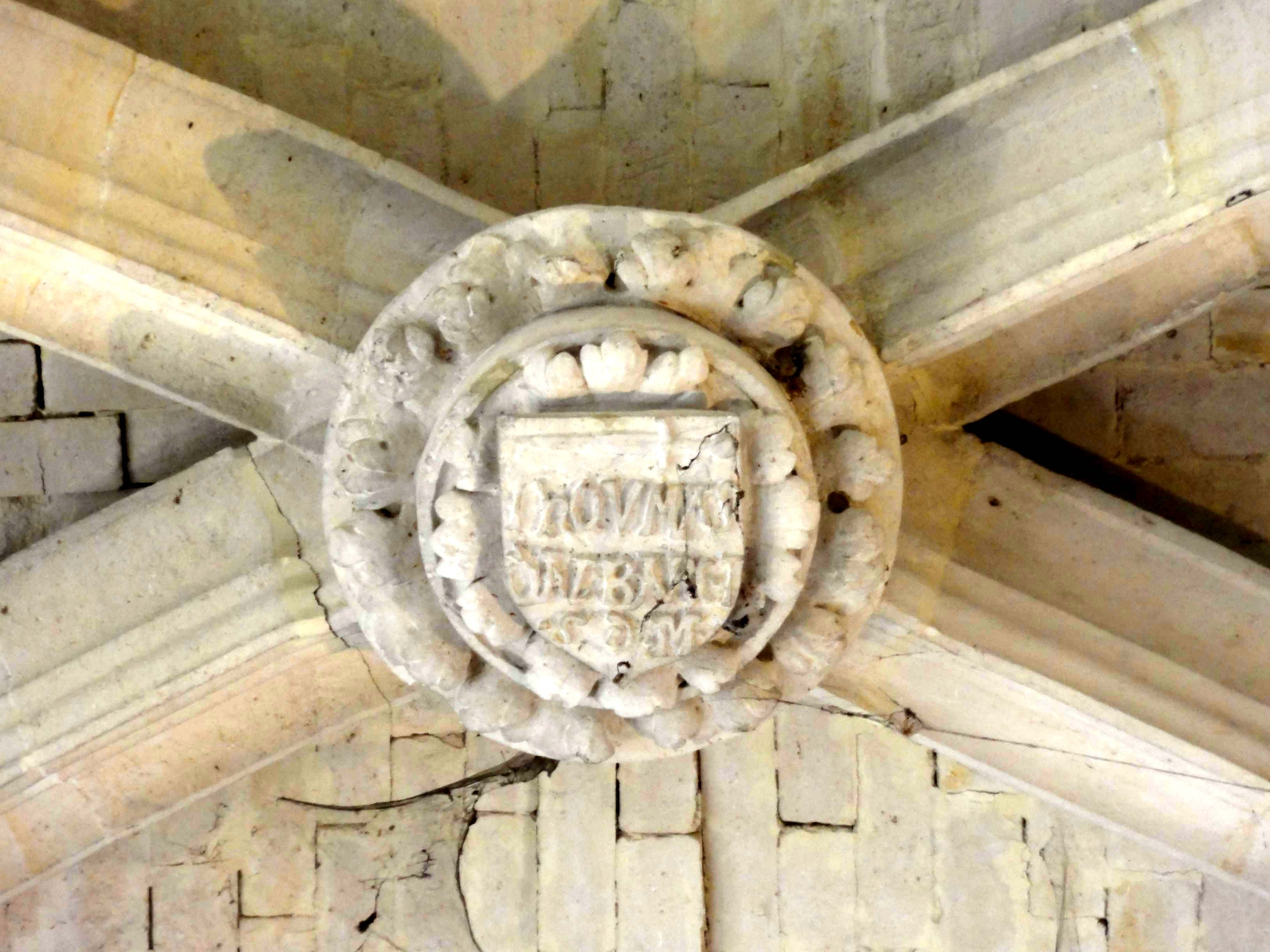 Intérieur de l'église (voir titre).